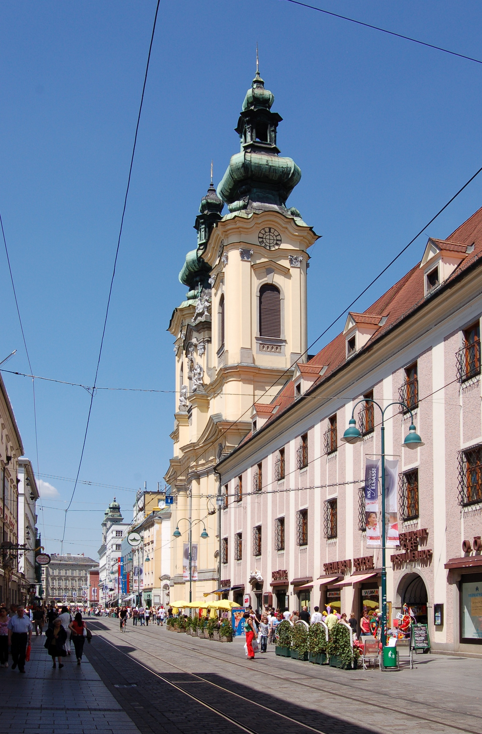 Ursulinenkirche in Linz gesehen von der Landstraße